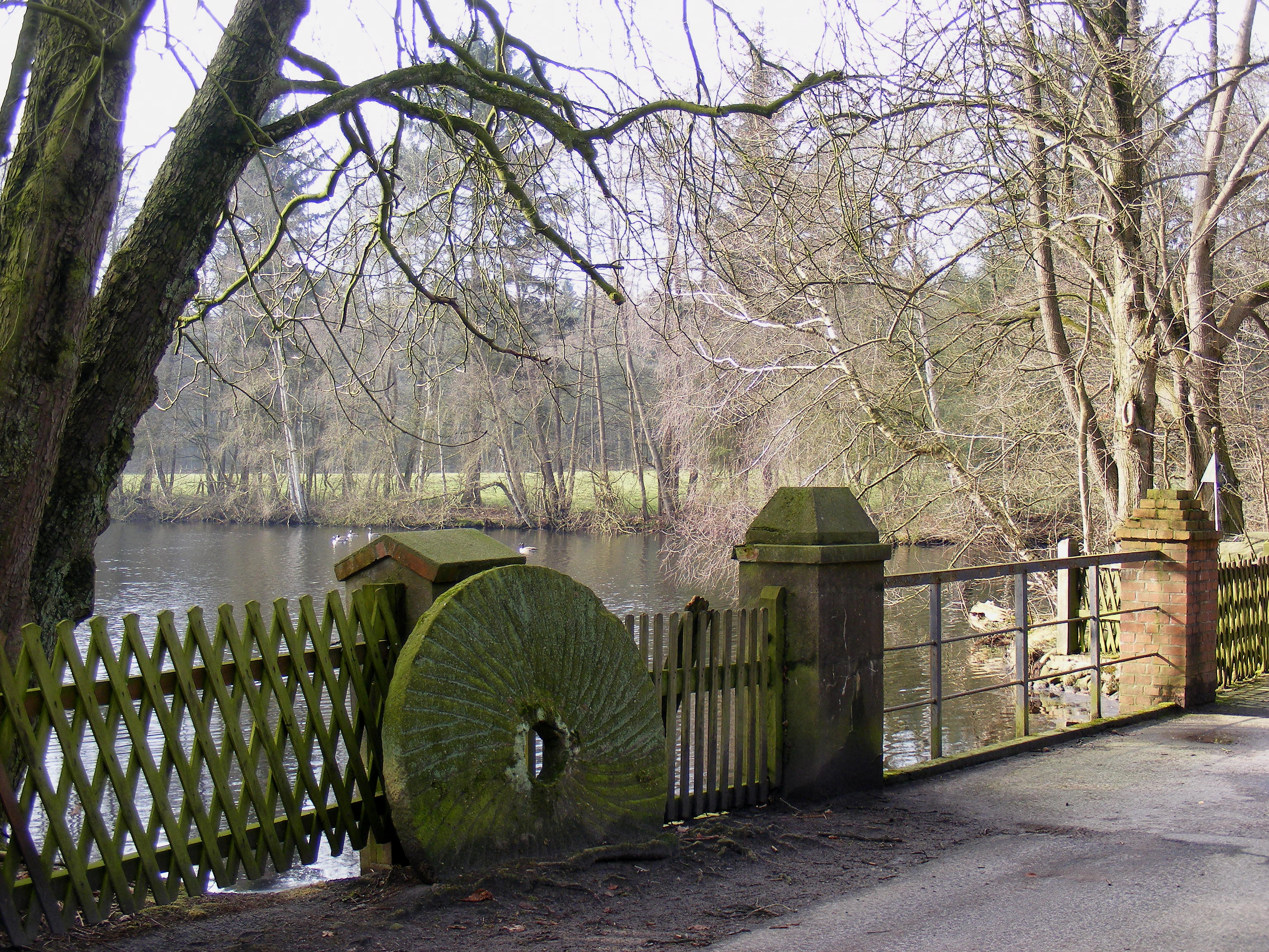 Mühlenteich der Kokenmühle in Visbek